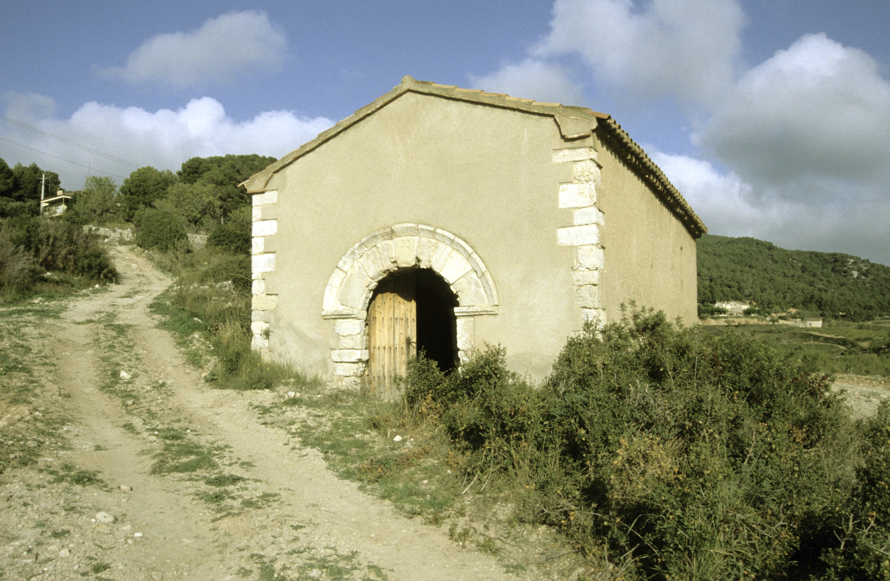 Selma. Capella del mas de Sta. Agnès. Fot. J. Fuguet, 1996.